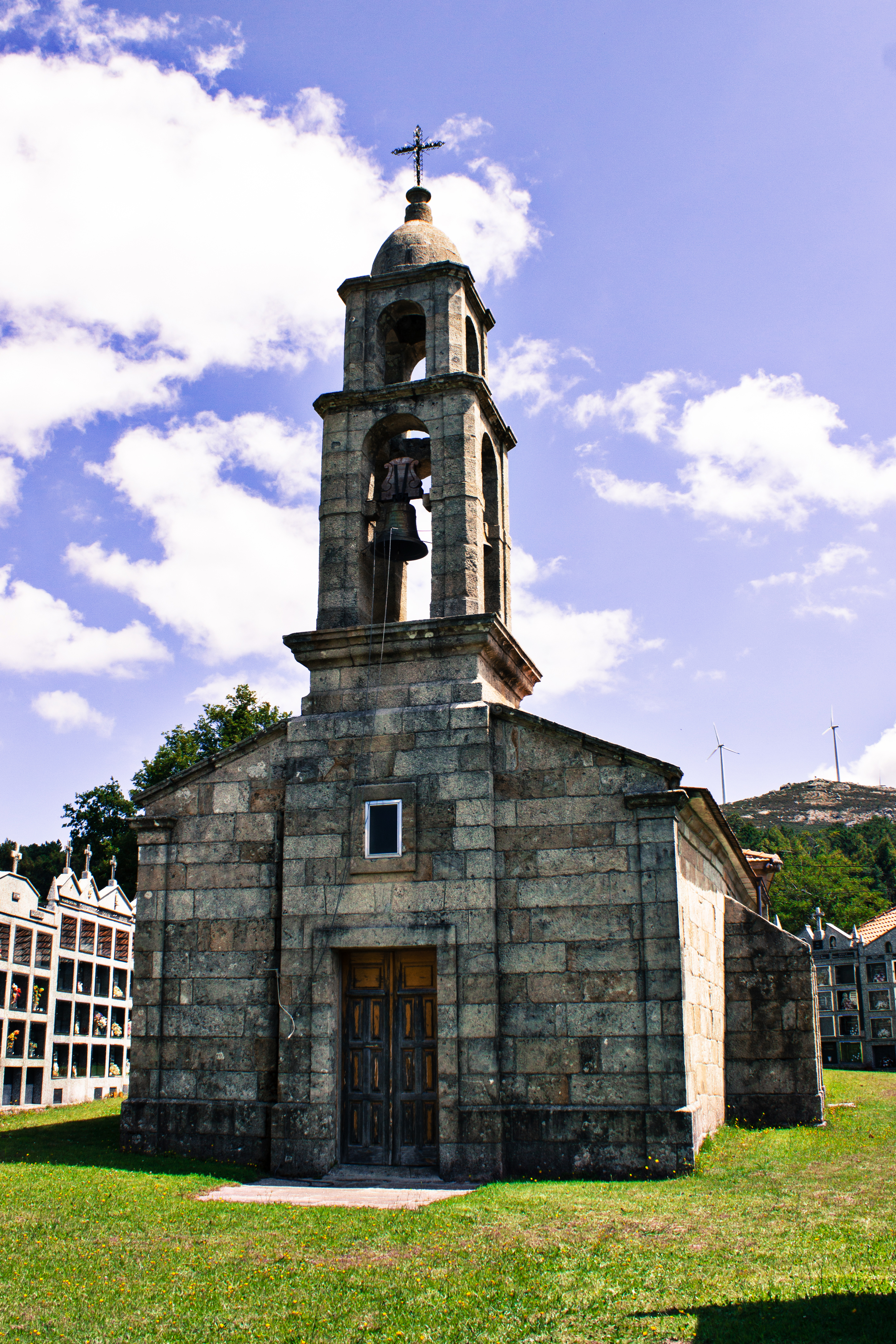 Igrexa de Petán, A Cañiza.